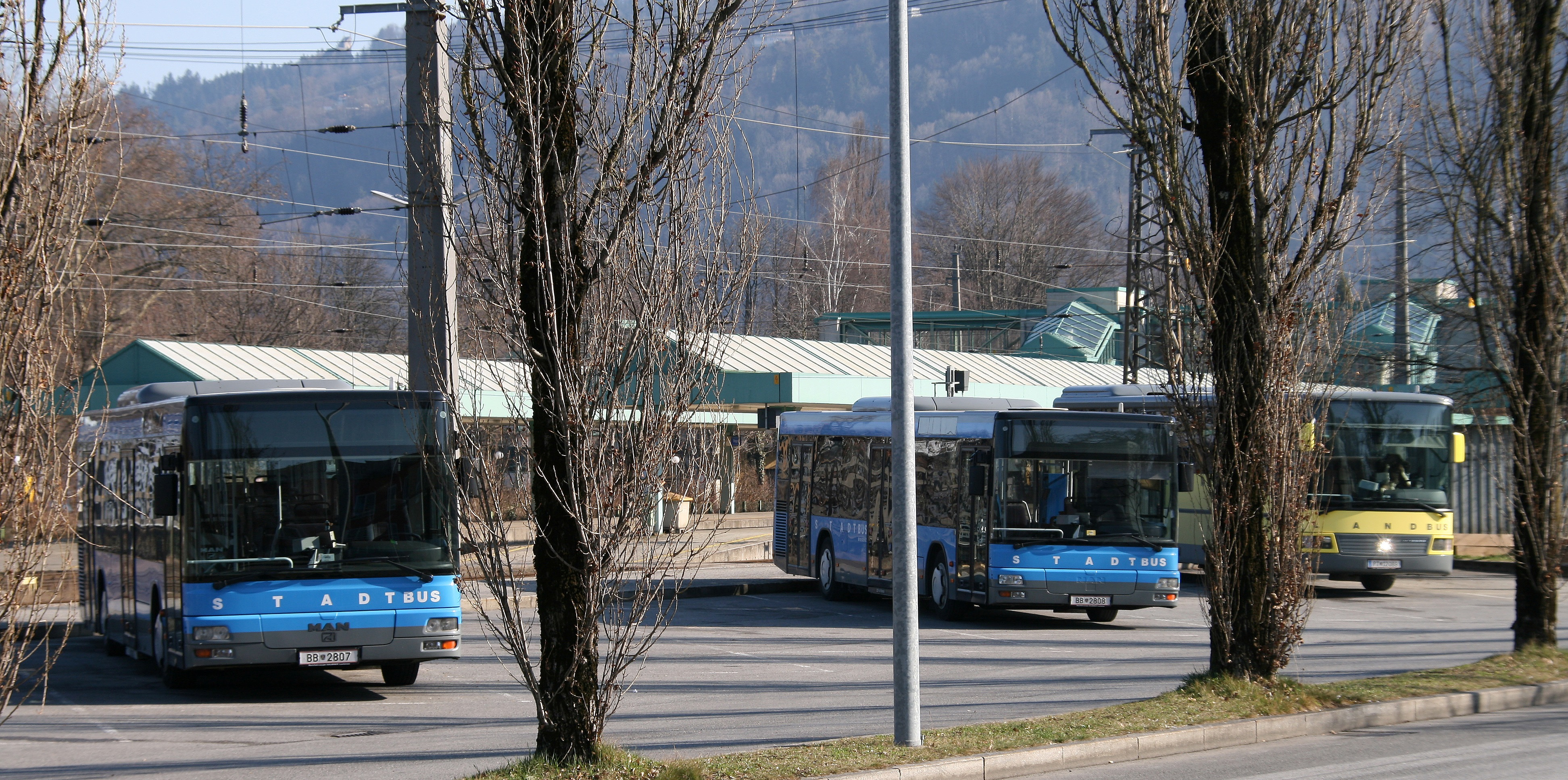 Stadtbus in Bregenz, Vorarlberg.